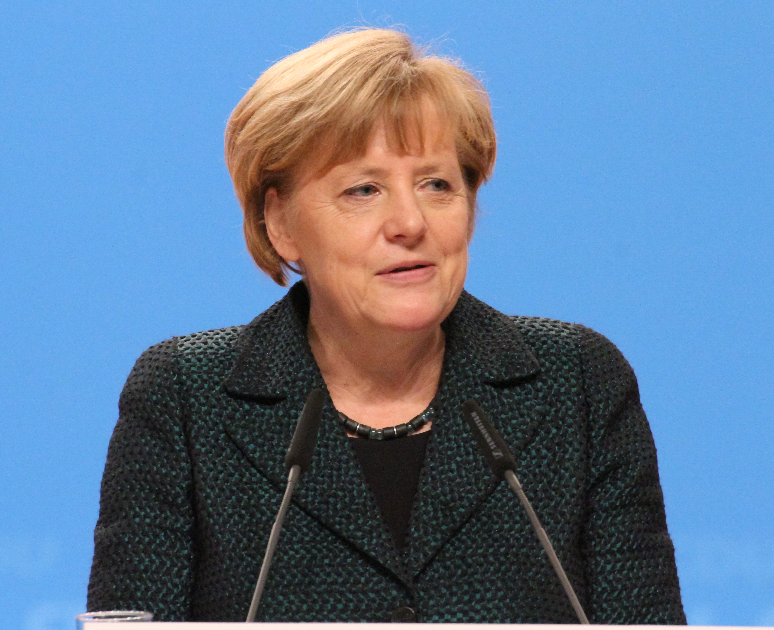 Angela Merkel auf dem CDU Bundesparteitag Dezember 2014 in Köln